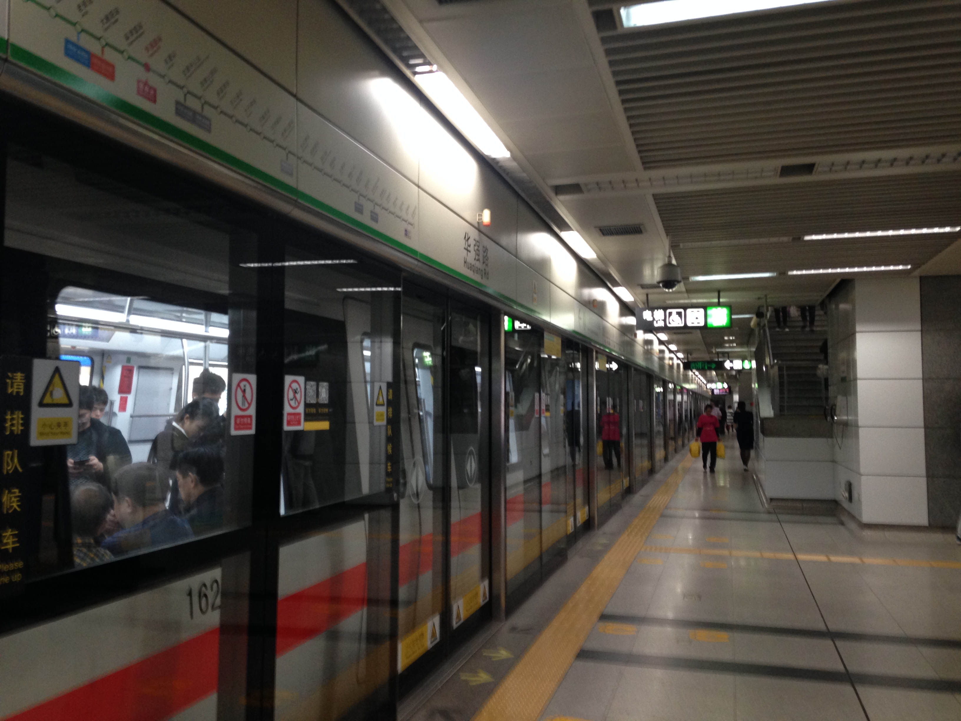 華強路駅のホーム